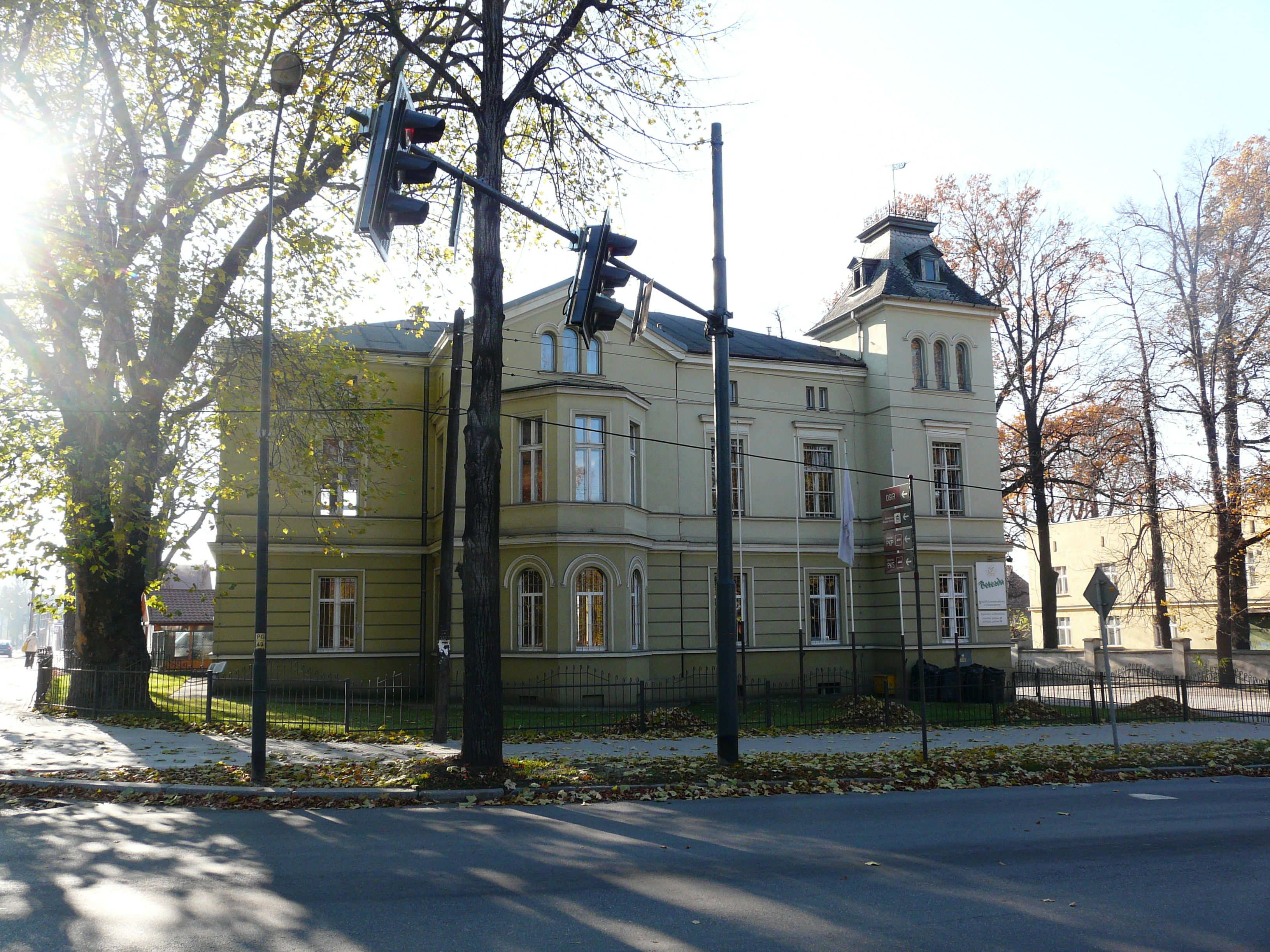 kaplica zielonoświątkowa Betzeda